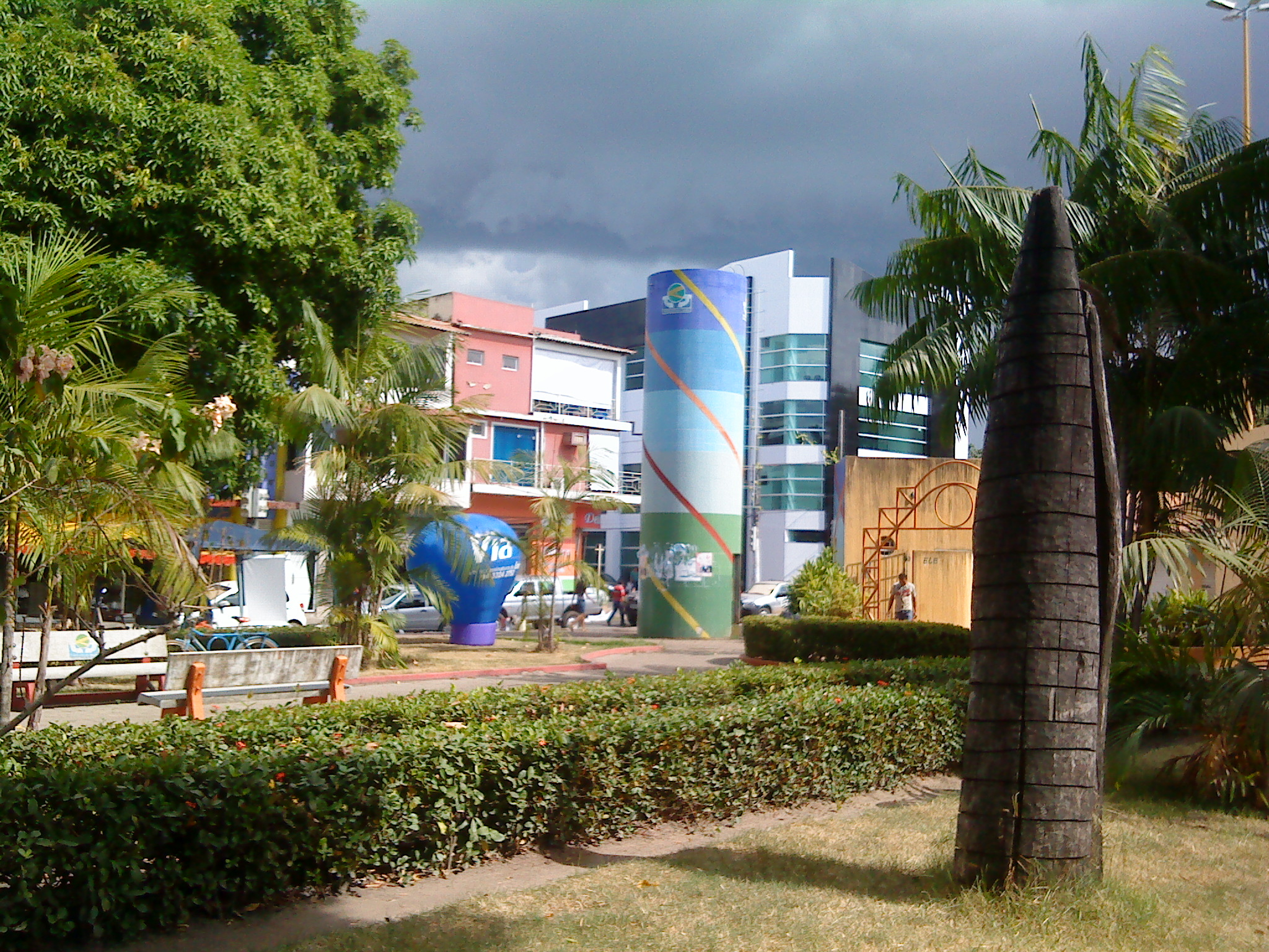 Praça Duque de Caxias, no bairro do Comércio, em Marabá.